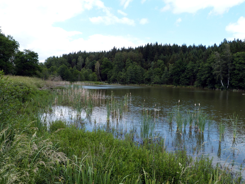 (LSG:BW-1.36.044)_Frankenbachtal, Espachweiher